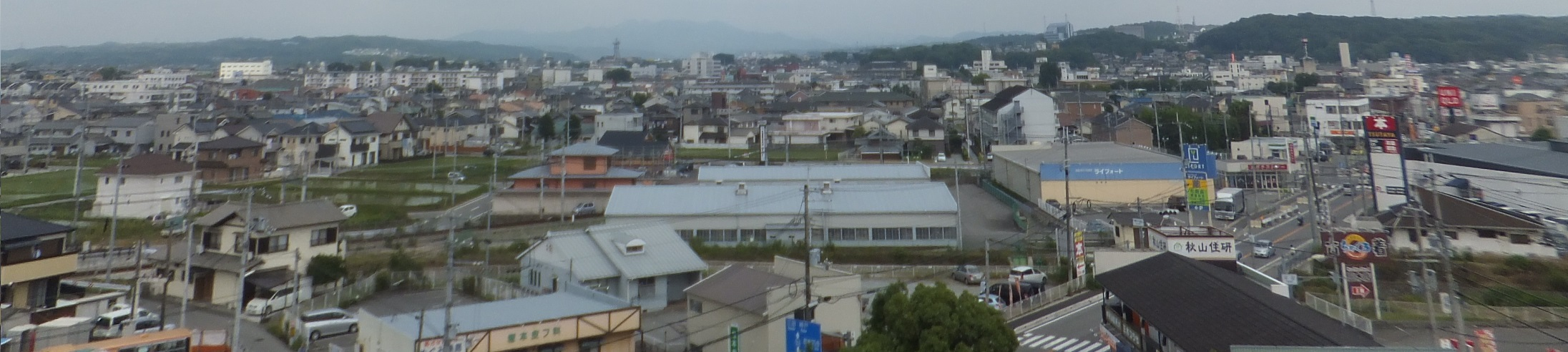 三木市街地